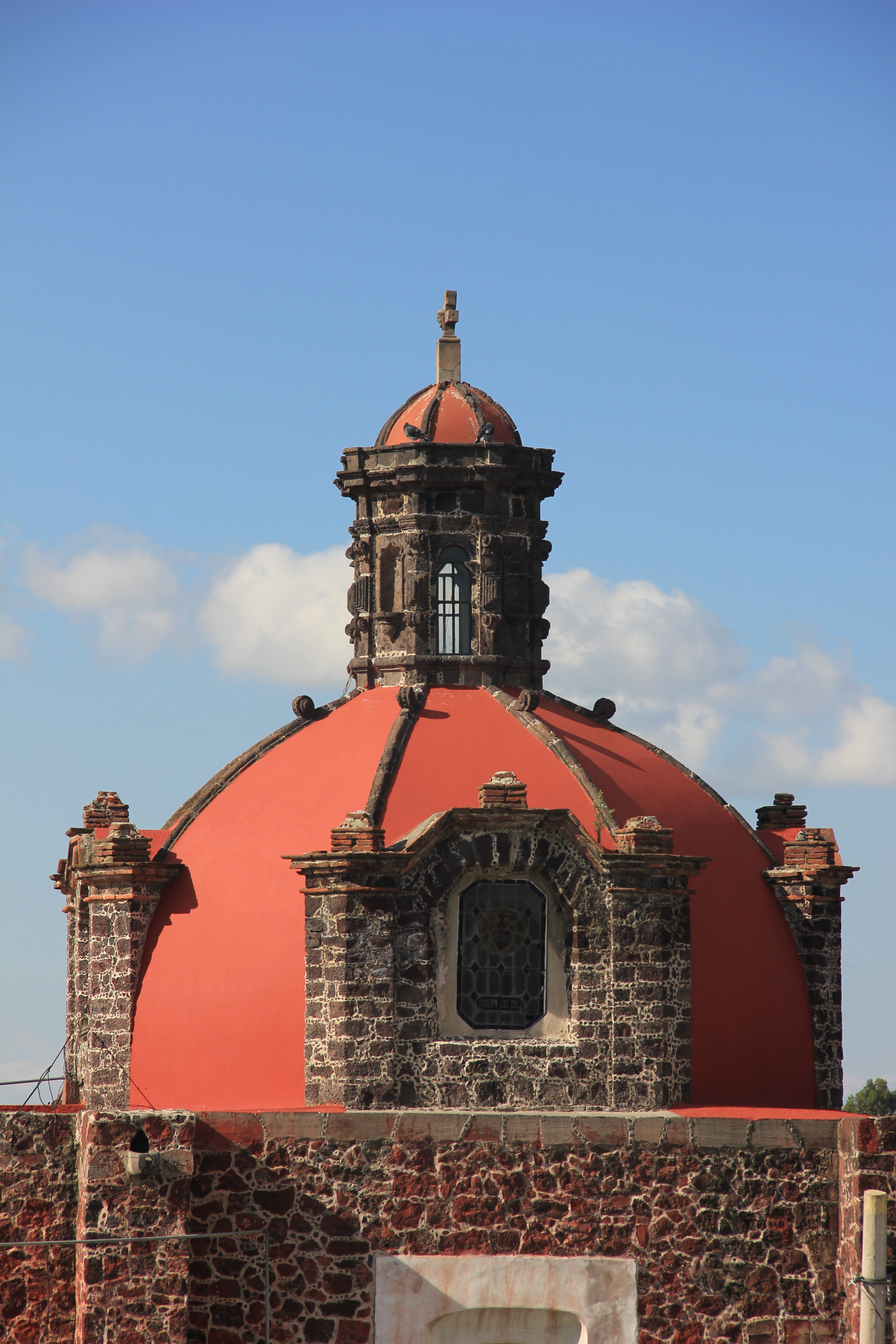 Detalle de la cúpula de la Parroquia de San Pedro Atzompa